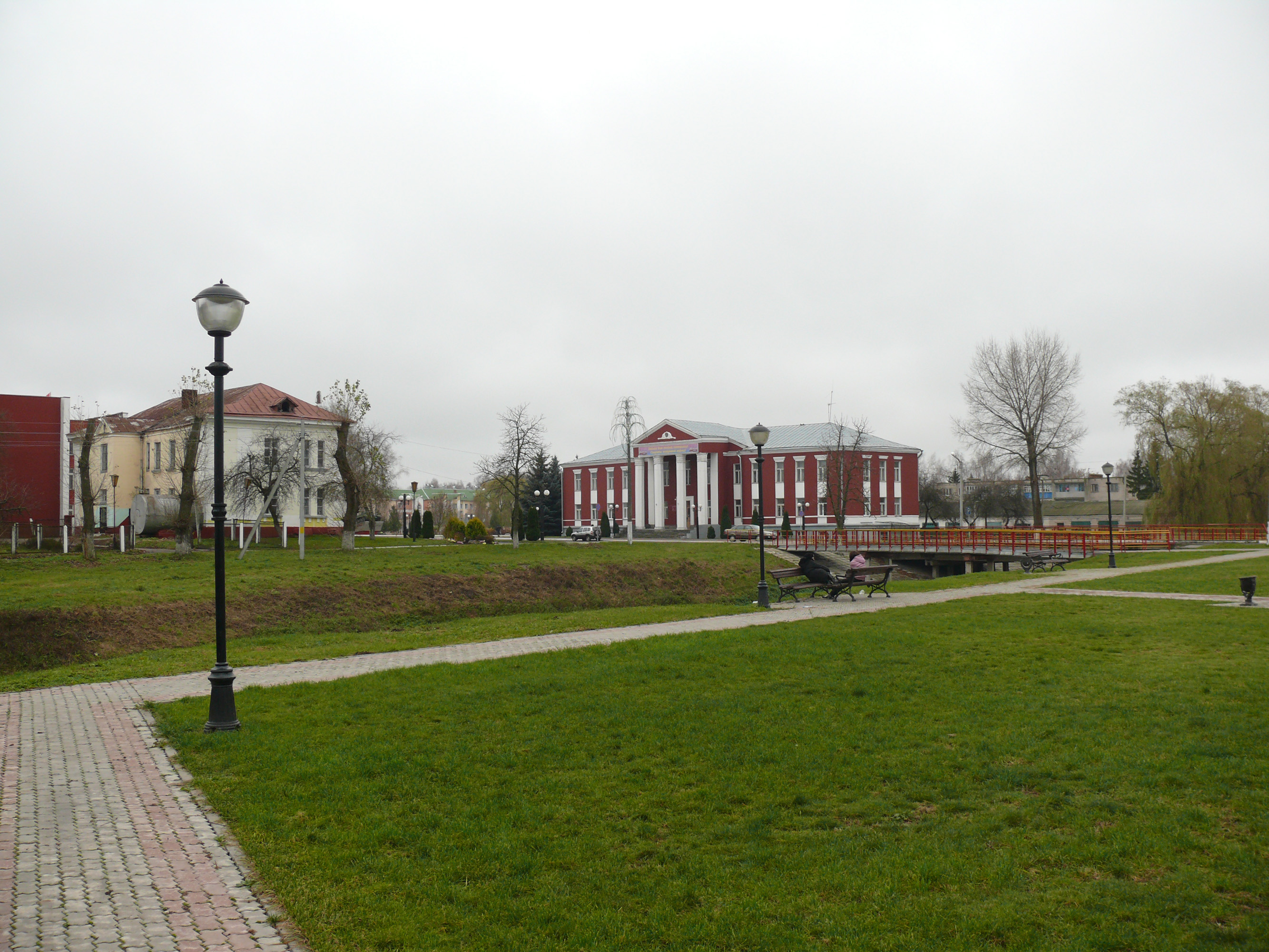 Посёлок Брагин Гомельской области Белоруссии